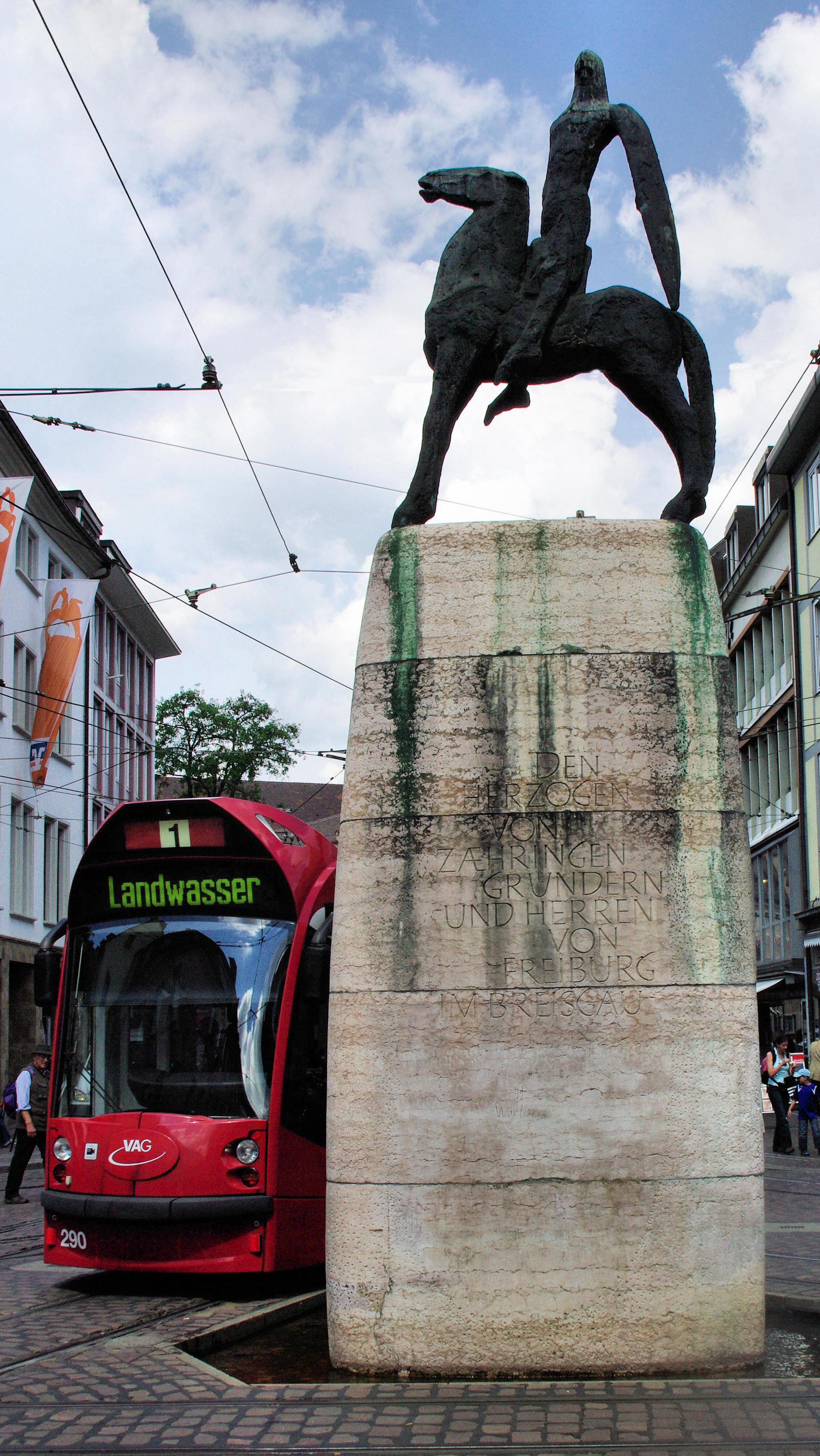 Der Bertoldsbrunnen in Freiburg, wird aus den Bächle gespeist.